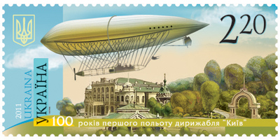 Художня поштова марка «100 років першого польоту дирижабля «Київ» (№ 1118). Формат марки – 52х25 мм. Перфорація гребінчаста – 13 3/4:14 1/4. Номінал марки – 2,20 грн. Кількість марок в аркуші – 15 (3х5). Тираж марки – 205 000 примірників. Захист марки: мікротекст «Т. Нестерова»; в УФ променях світиться зображення дирижабля. Поля маркового аркуша художньо оформлені. Дизайн марки та штемпеля Тетяни Нестерової. Марка – багатоколірна; спосіб друку – офсет. На полях маркового аркуша надруковано штриховий код – 4823027131153. Зам. 1-3311. 06.07.2011. Марку надруковано на ДП «Поліграфічний комбінат «Україна» по виготовленню цінних паперів».